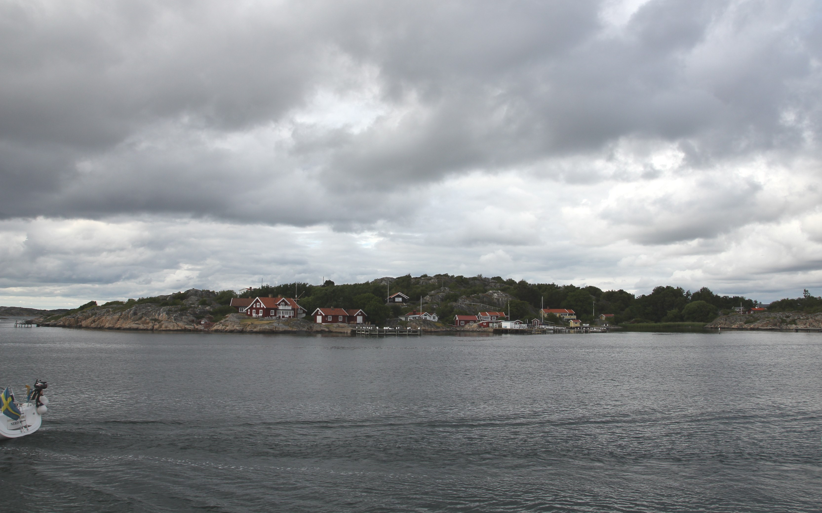 Från turbåten mellan Styrsö Tången och Källö